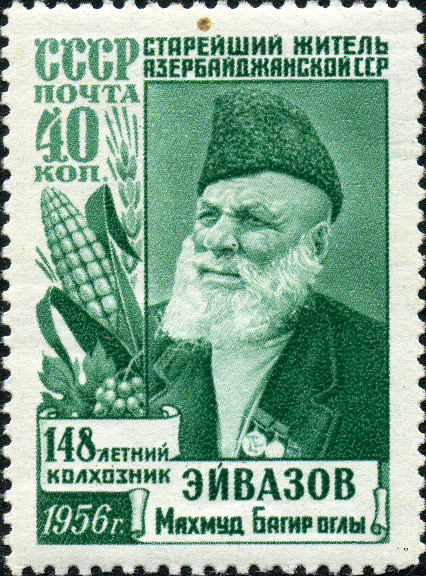 Марка СССР